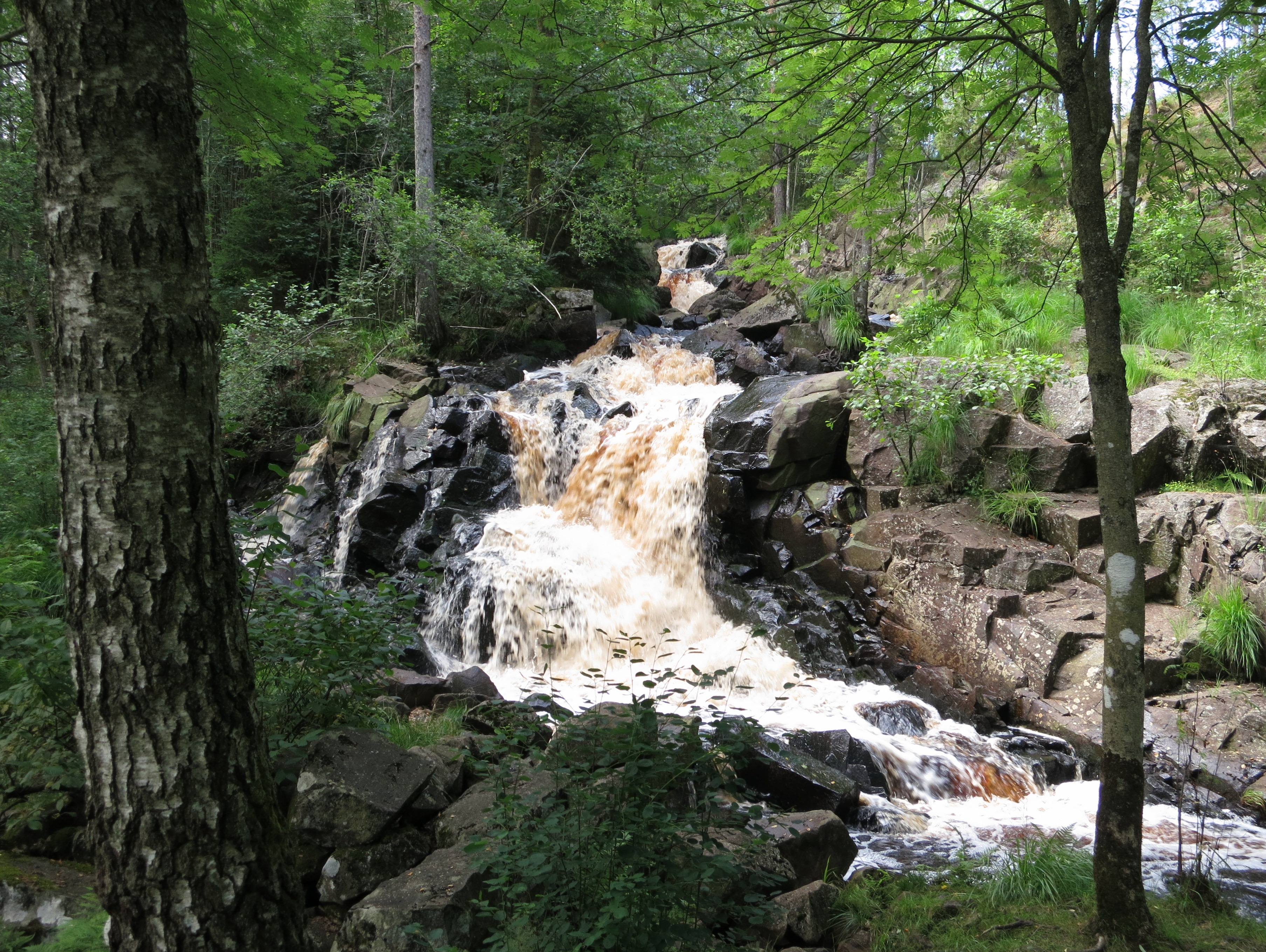 Bosgårdsfallen i Torup